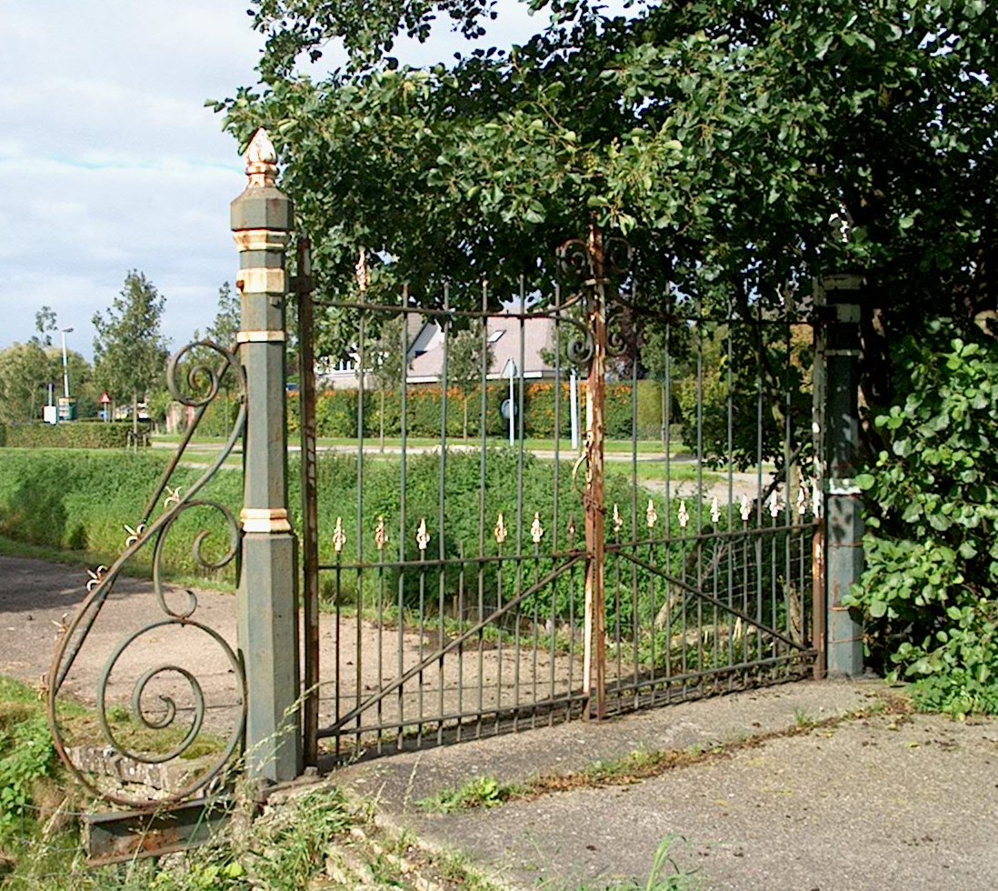 Toegangshek bij Westerblokker 159 (IM013806)